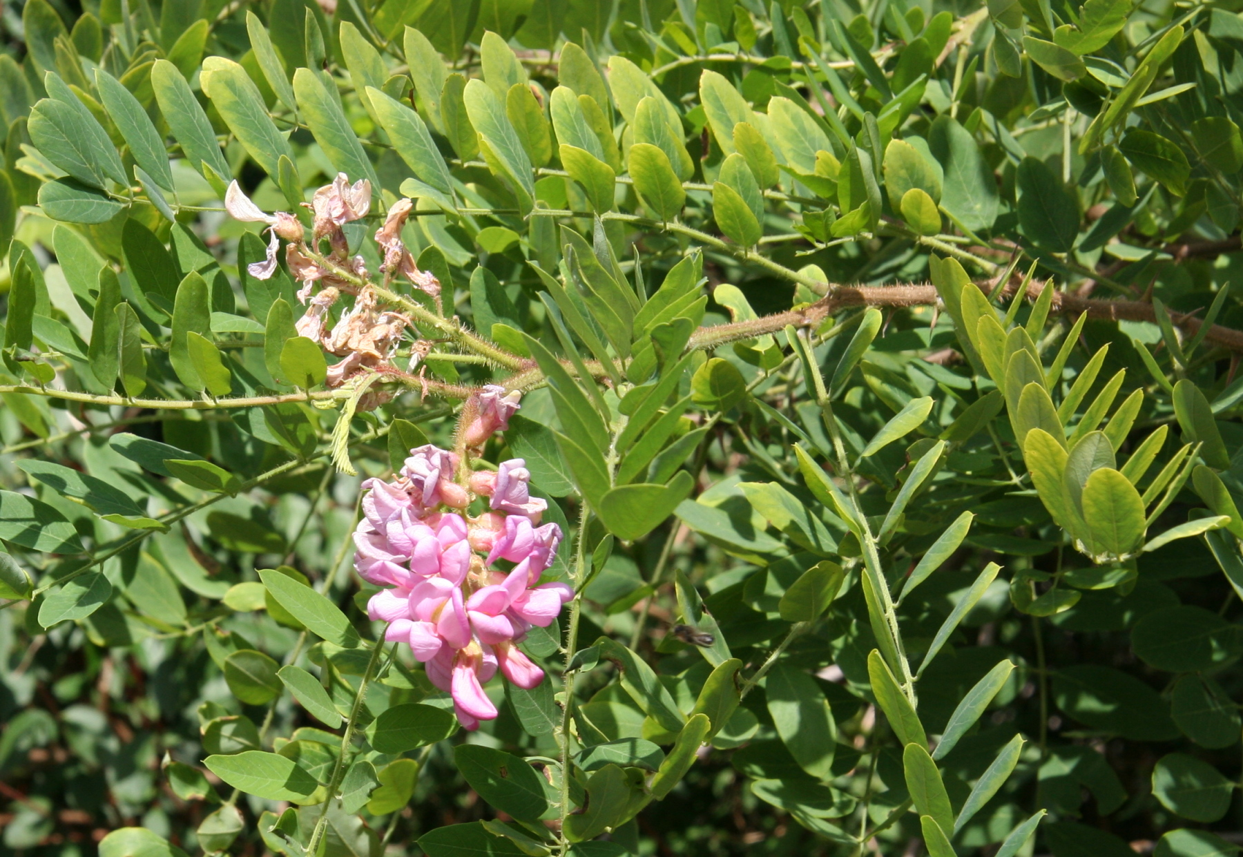 Robinia neomexicana im Botanischen Garten Dresden